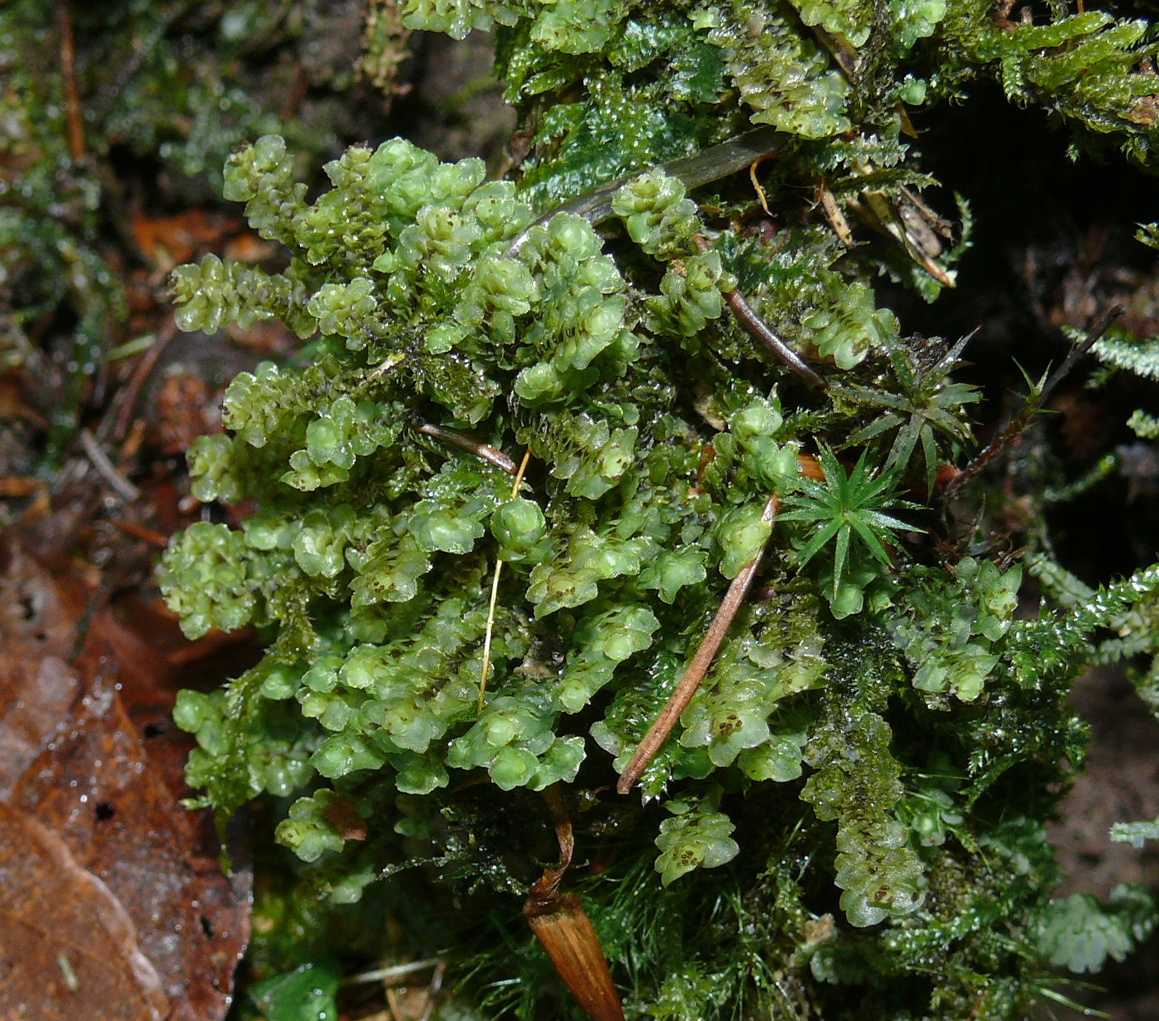 Scapania nemorea slightly frozen, Schwäbisch-Fränkische Waldberge, Germany